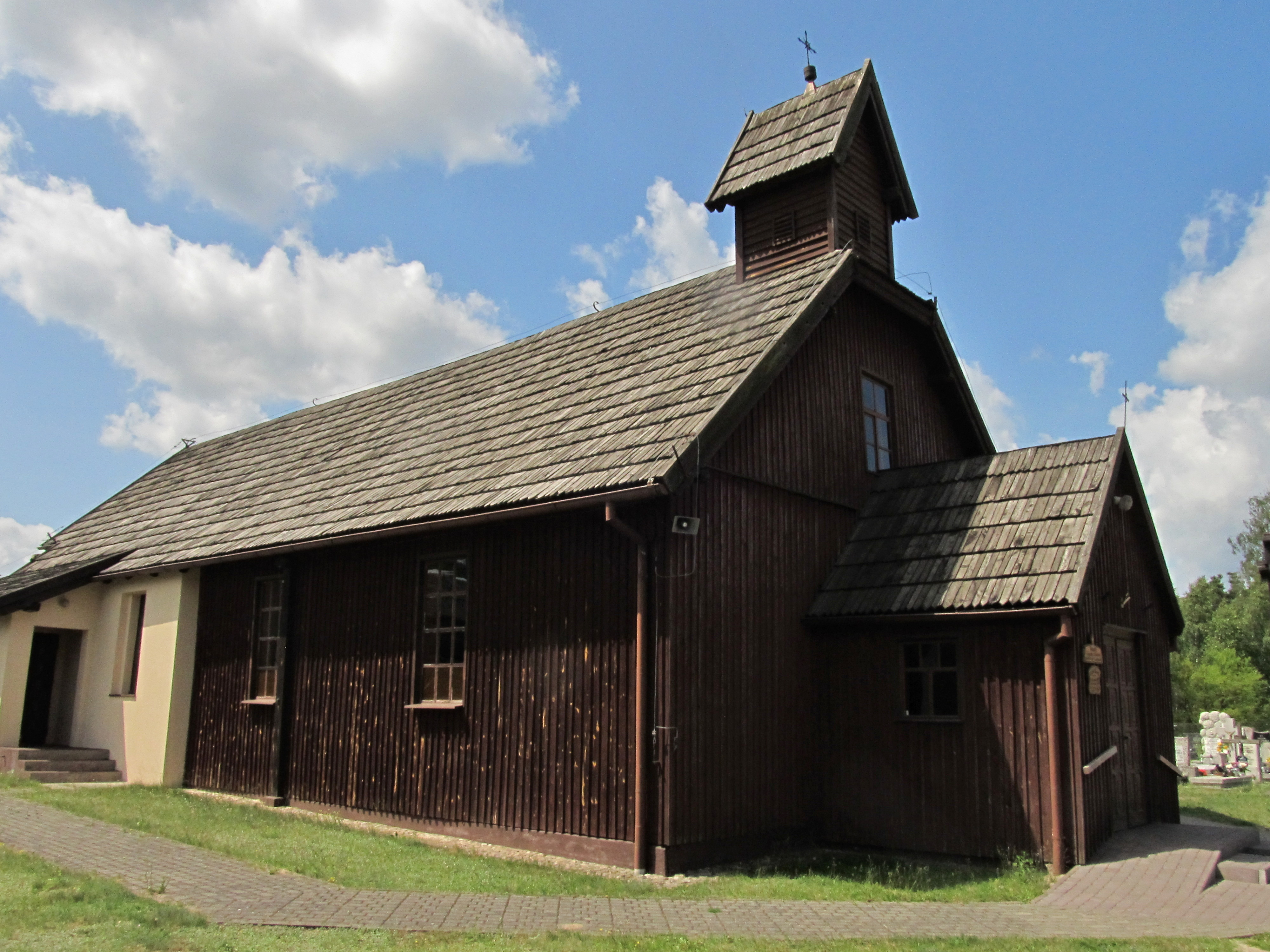 Olpuch - rzymskokatolicki kościół filialny p.w. MB Częstochowskiej (prawa, boczna ściana)